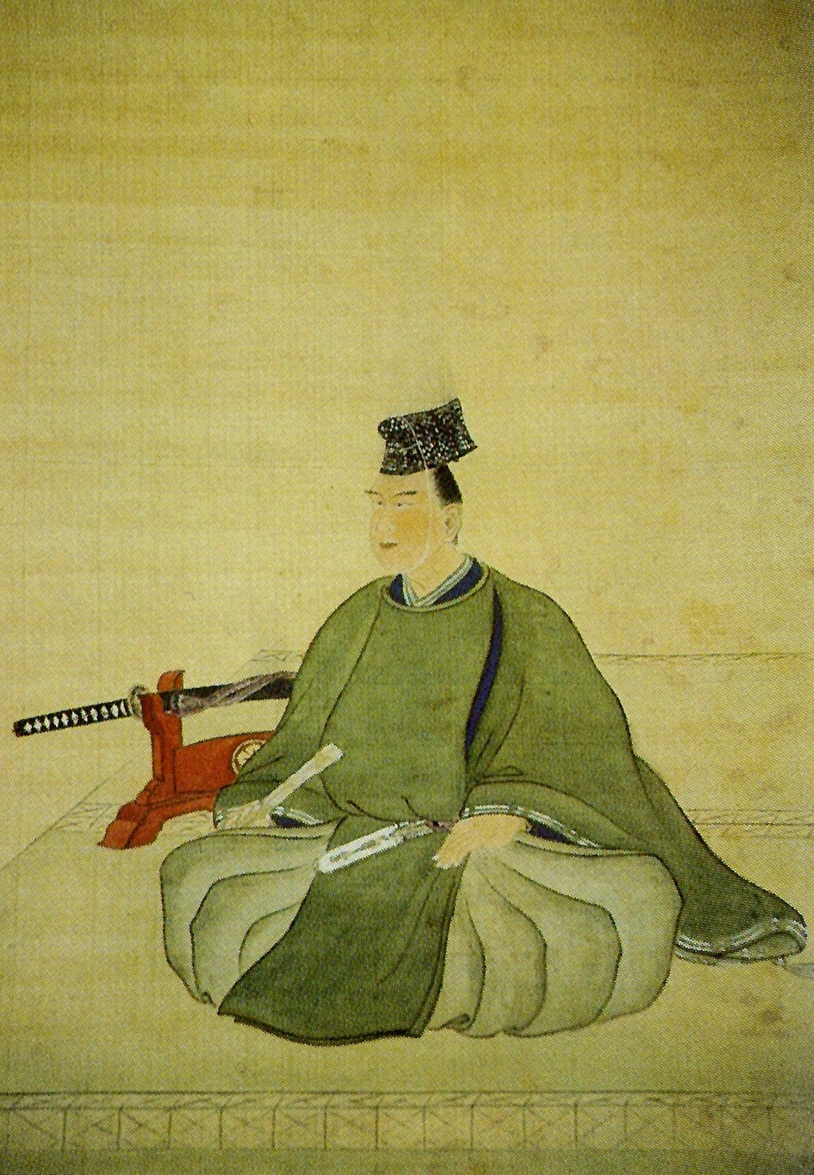 多久茂澄の肖像。